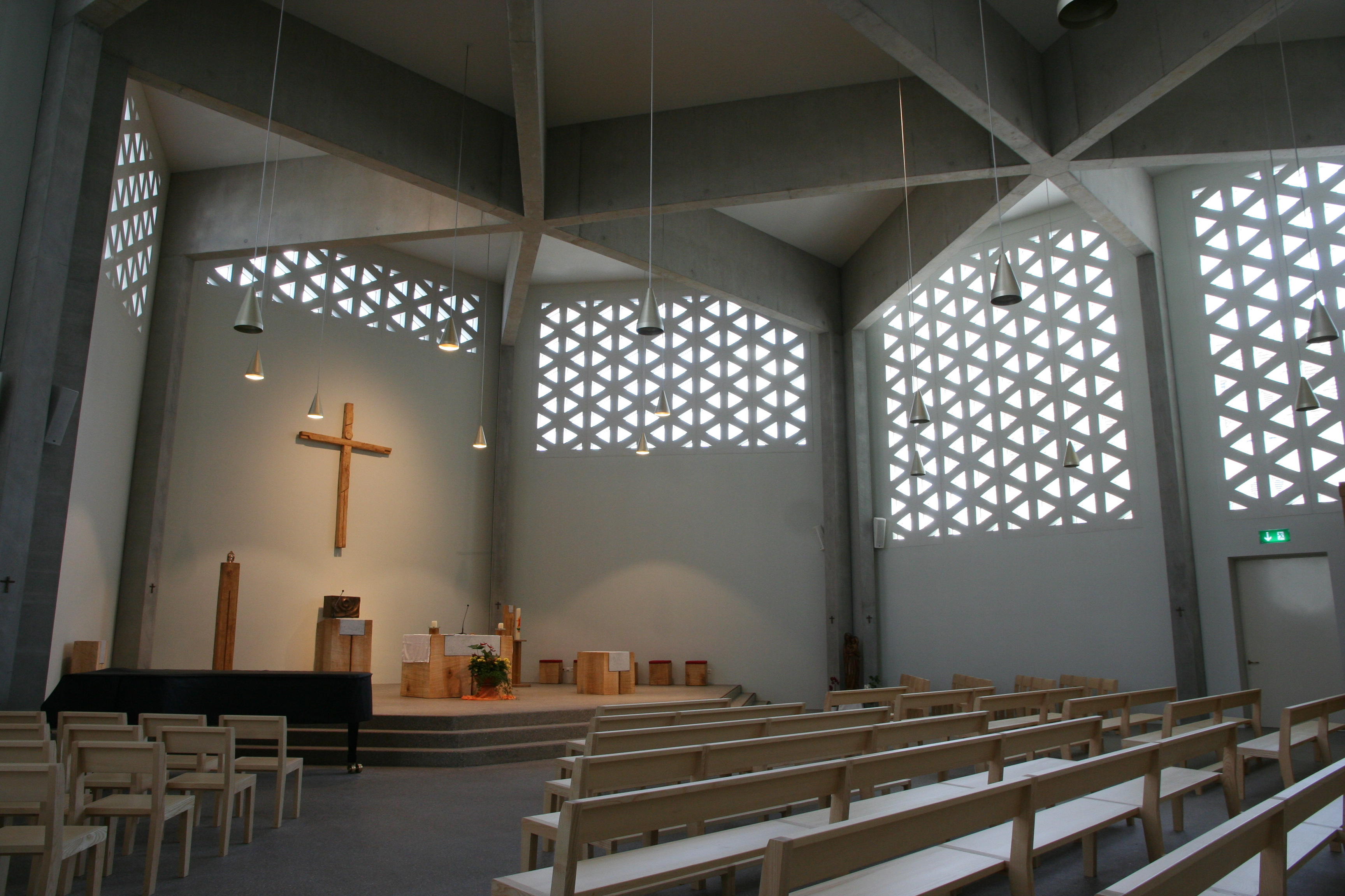 röm.-kath. Kirche St. Mauritius Bonstetten vom 2016